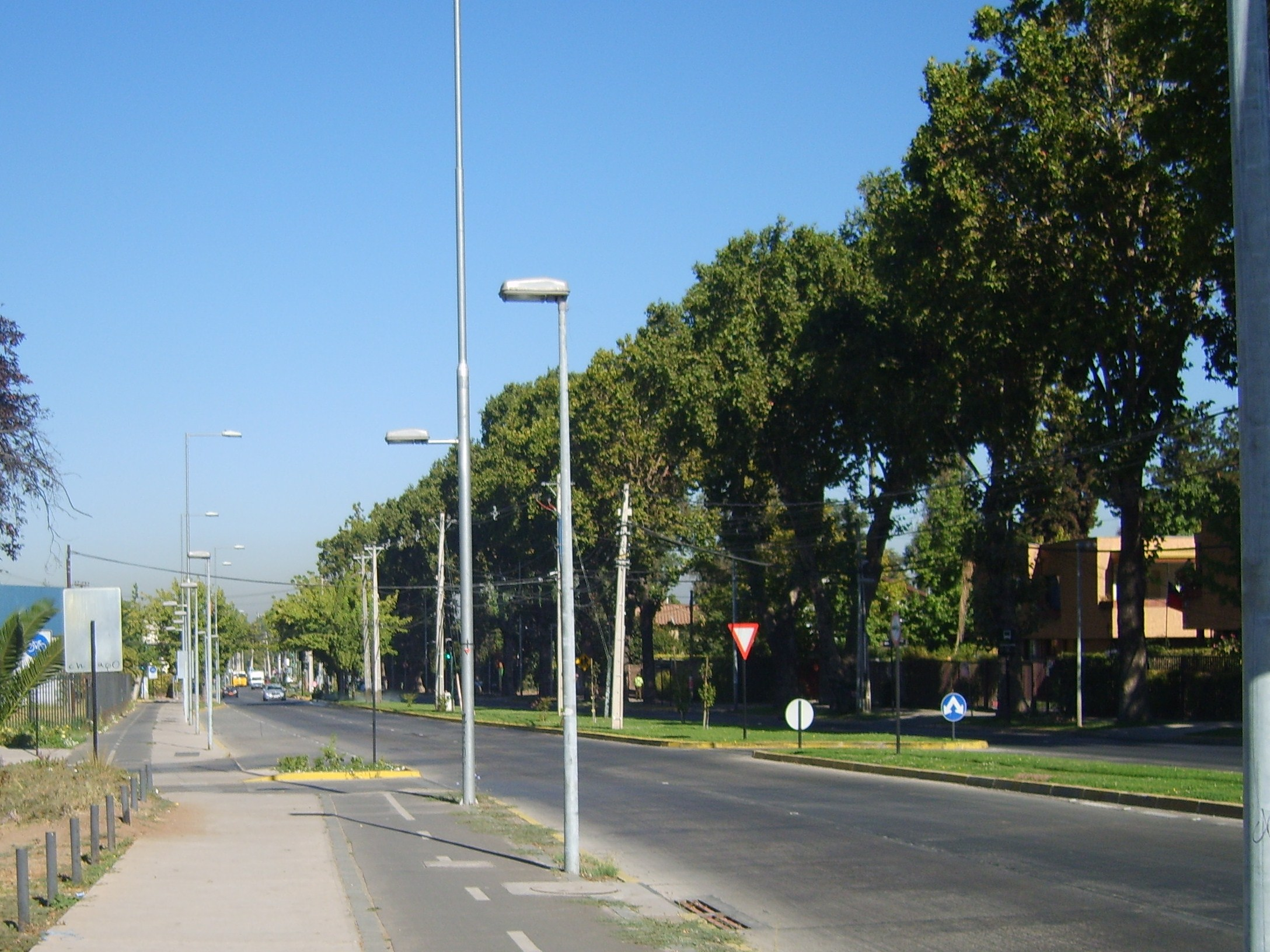 Avenida Larrain, La Reina, Santiago de Chile